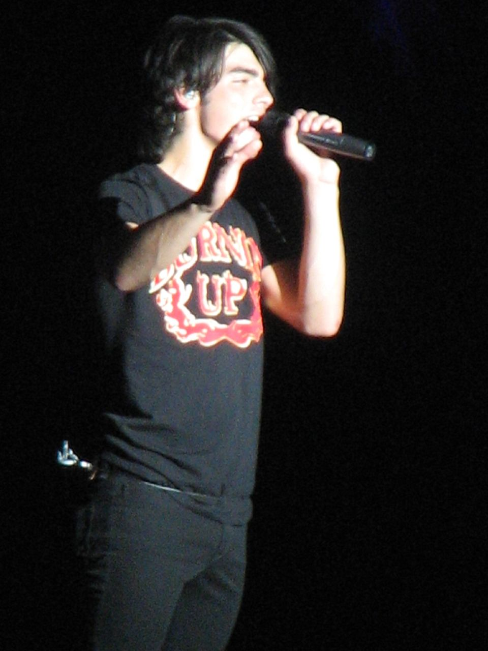 Joe Jonas